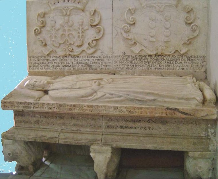 Il sepolcro di Antonio Ventimiglia, conte di Collesano, Gran Camerario e Vicario generale del Regno di Sicilia, e della moglie Elvira Moncada, risalente all'anno 1406.